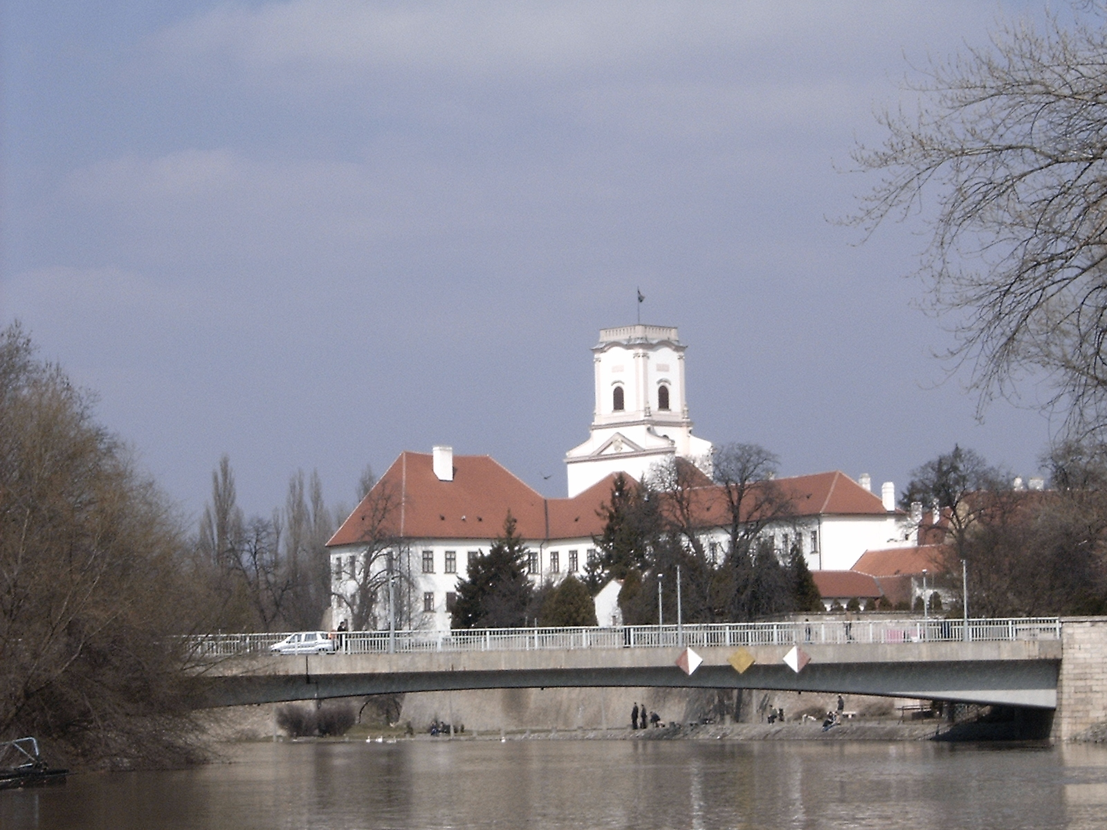 Győri püspökvár_a_Kettőshíddal